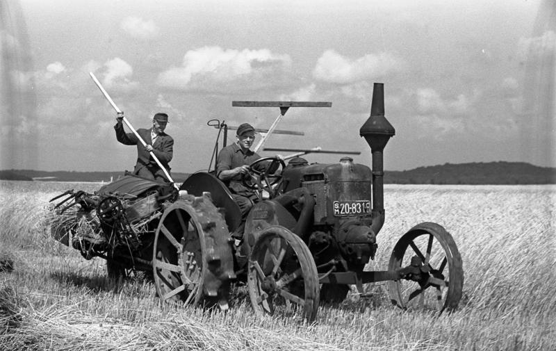 Rügen, Ernte von Getreide ADN-ZB/Blunck - Roggenernte auf Rügen 1949 [Traktor auf Roggenfeld]